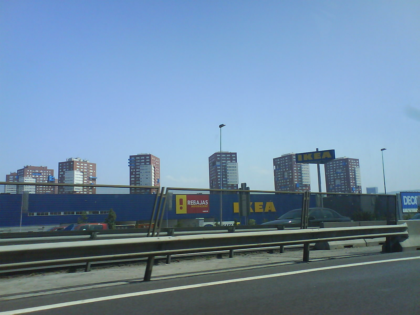 torres de san vicente y megapark barakaldo